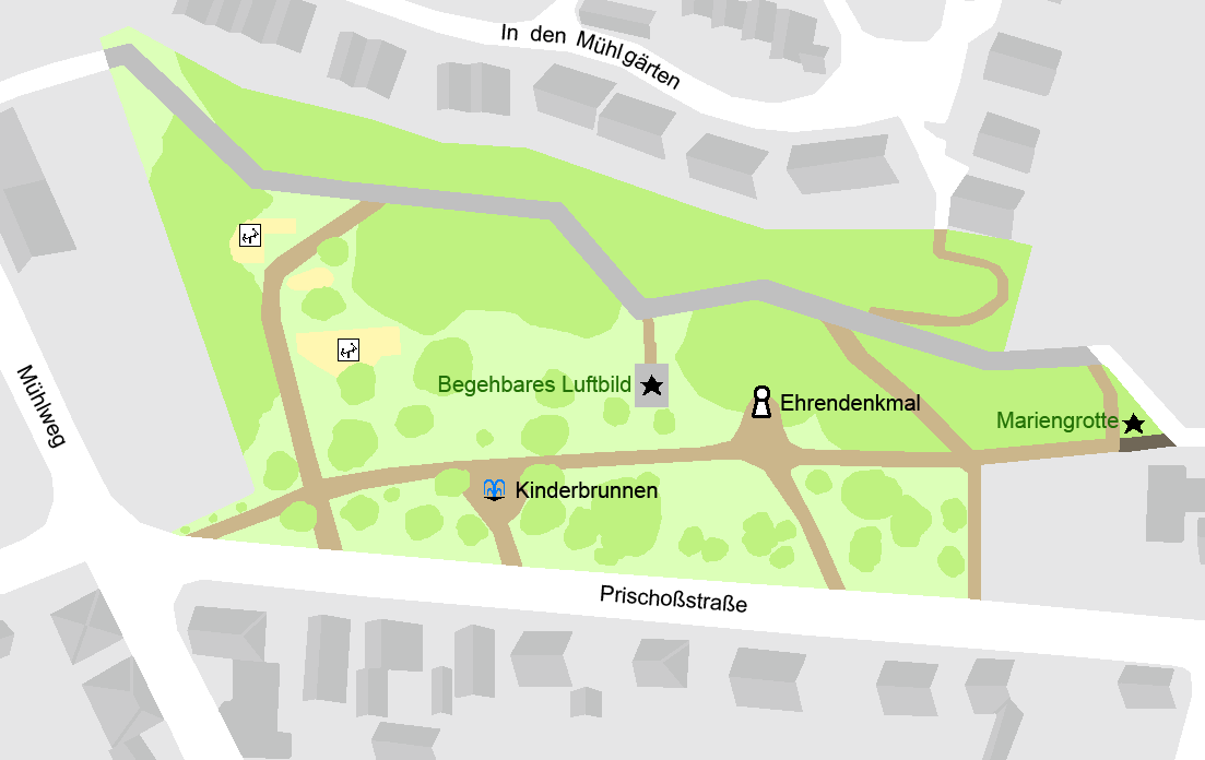 Karte des Hauckwaldes in Alzenau Baum Wiese Sand Sehenswürdigkeit Spielplatz Brunnen